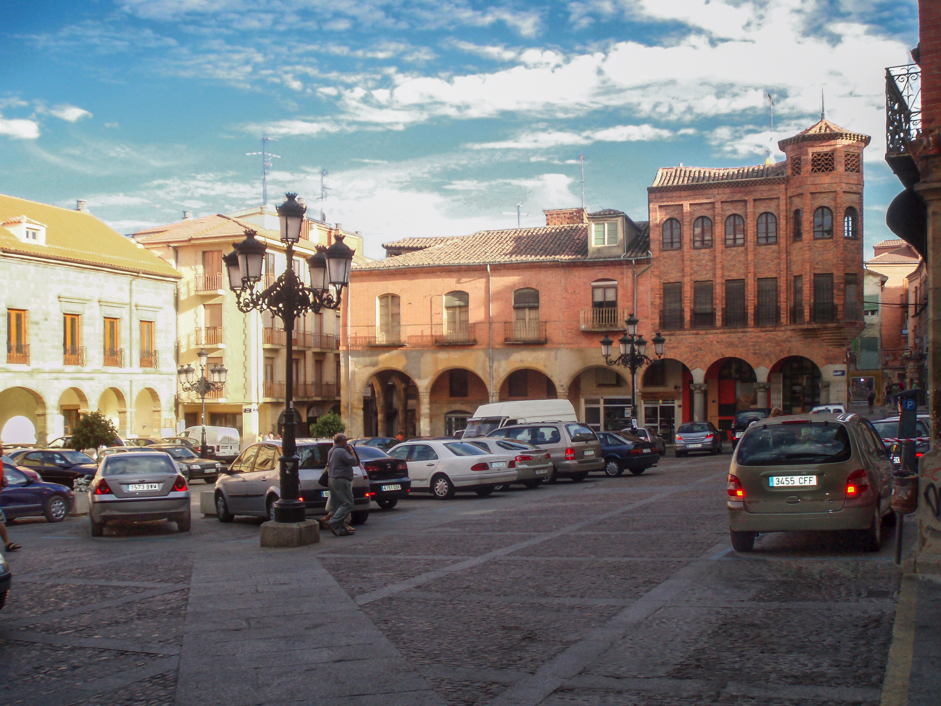 Plaza Mayor de Benavente, Zamora (España)